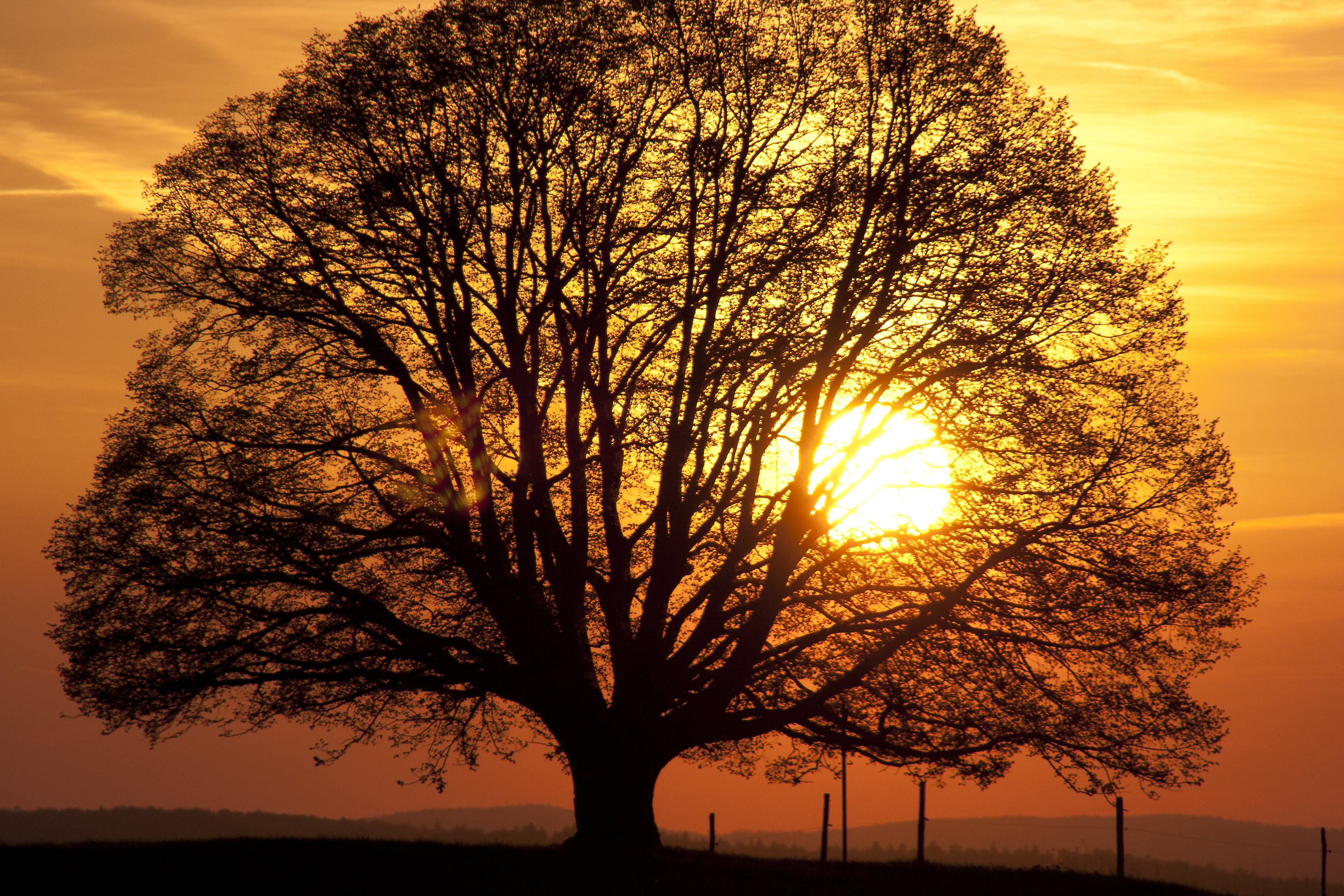 Sonnenuntergang am Lietebaum bei Möhra